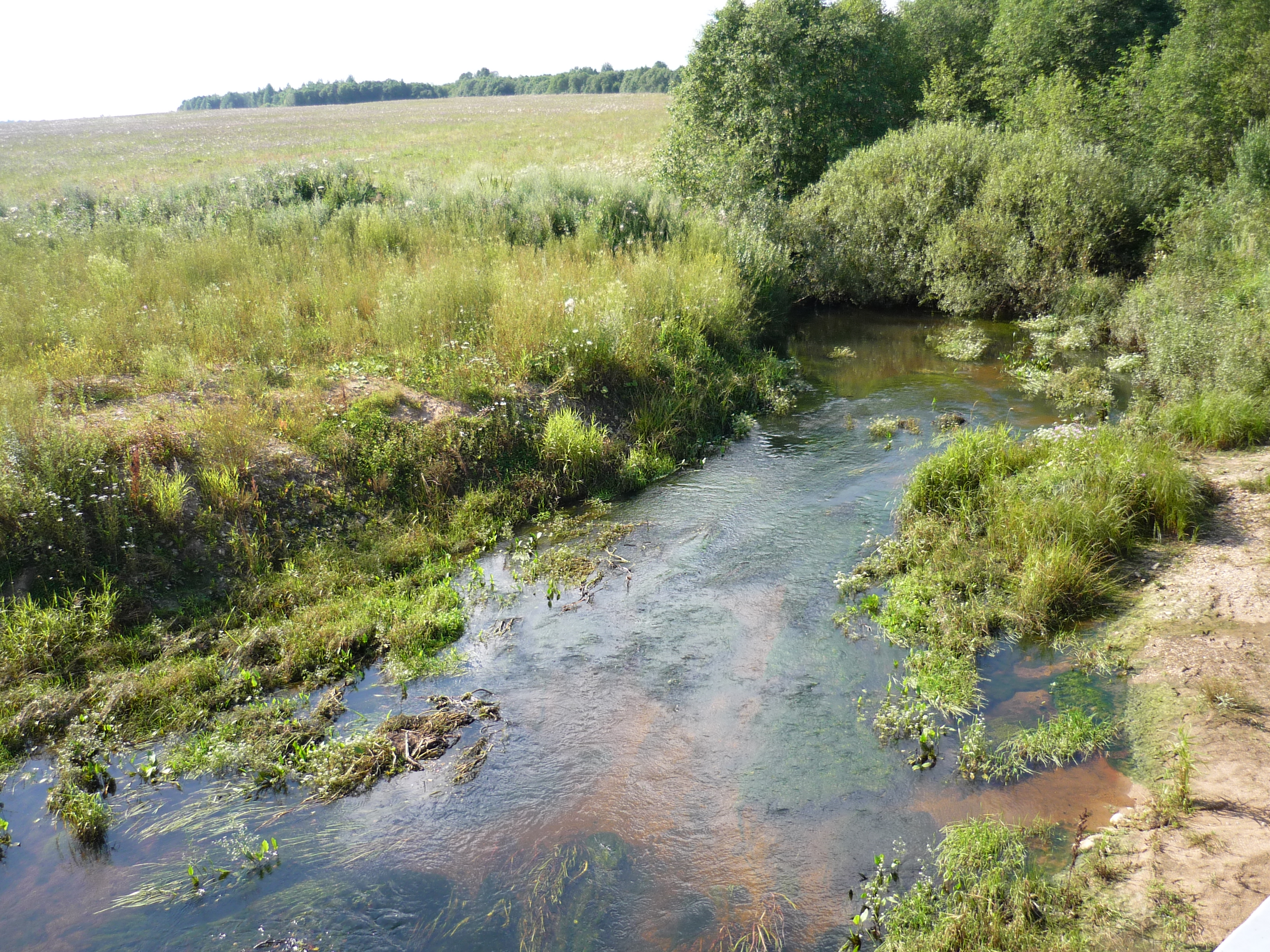 Река Яблоня недалеко от деревни Свиноройка